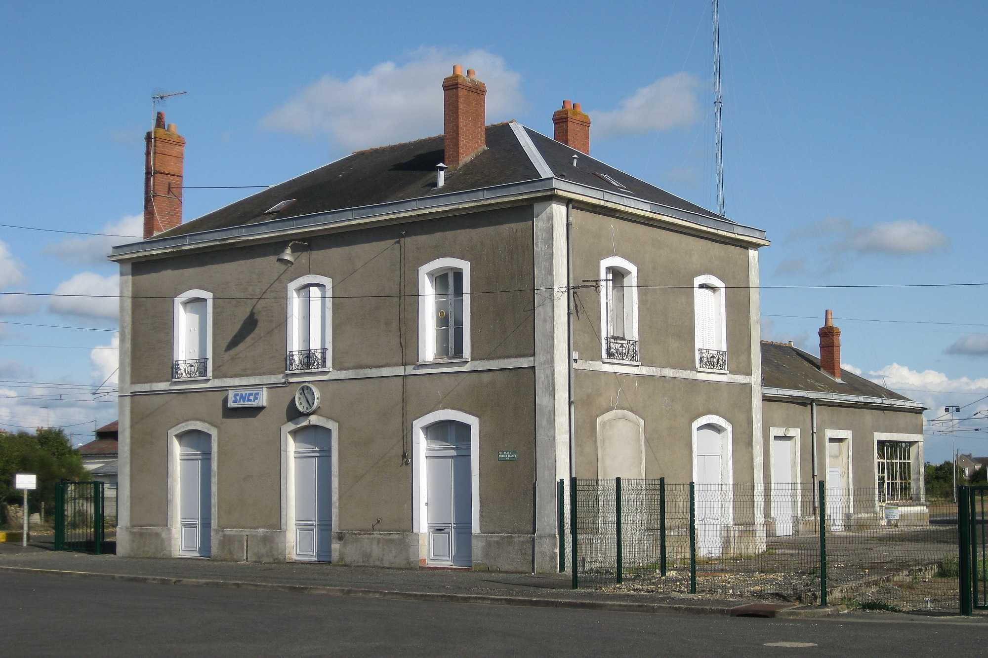 Ancien bâtiment voyageurs de la gare de Montreuil-Bellay